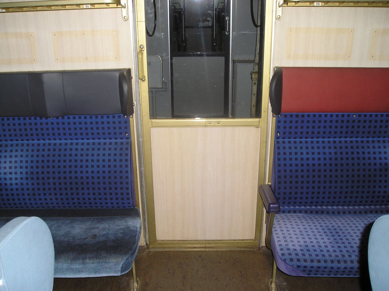 kunterbunte Inneneinrichtung in einem hessischen Bn